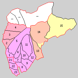 群馬県勢多郡の町村。